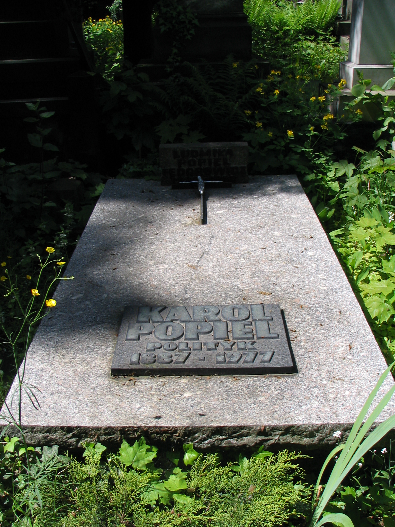 Nagrobek Karola Popiela na Cmentarzu Powązkowskim, Warszawa, 14 maja 2008. Karol Popiel.